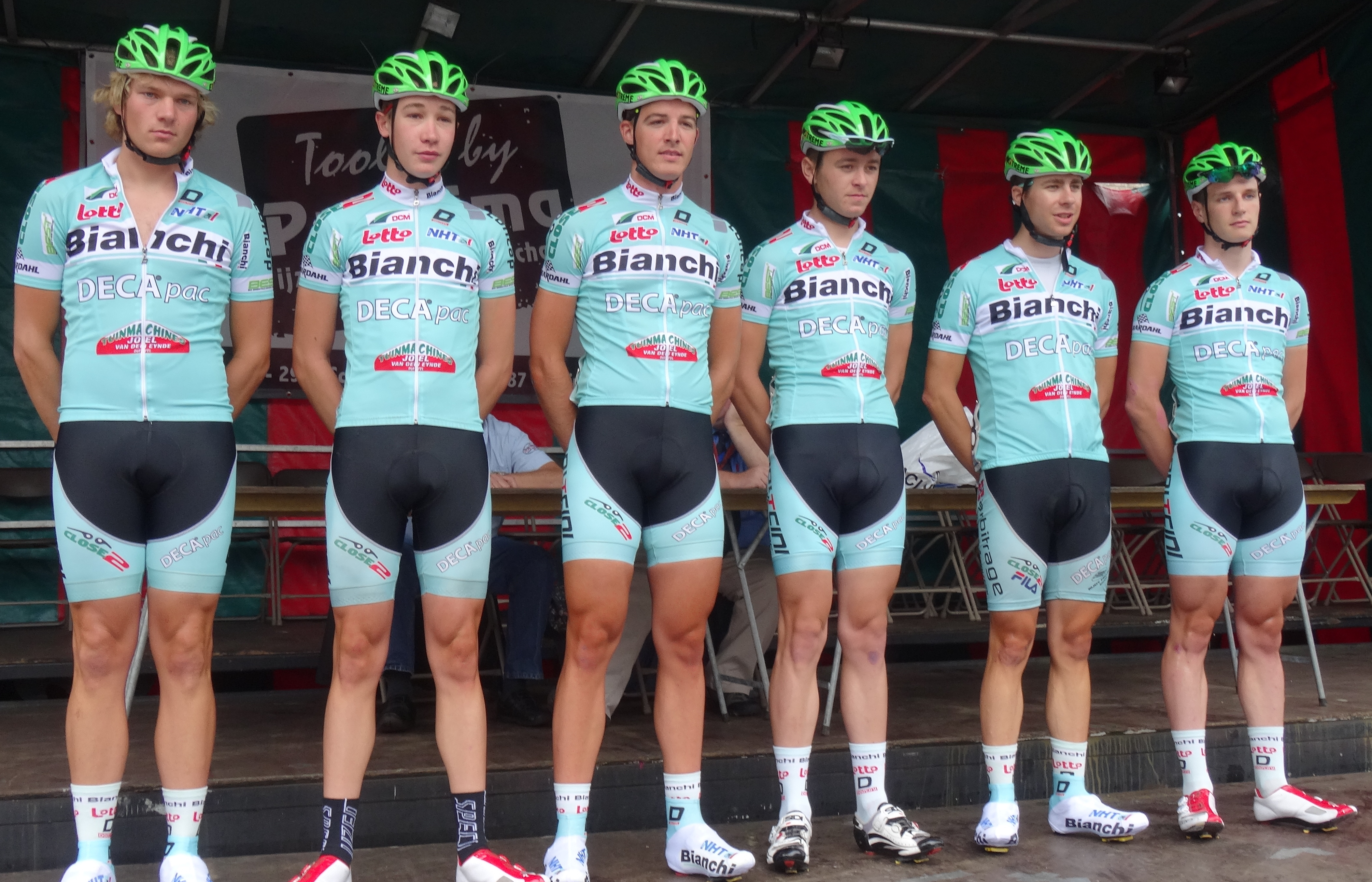 Reportage photographique réalisé le dimanche 10 août à l'occasion du départ et de l'arrivée de la Flèche du port d'Anvers 2014 à Merksem (Anvers), Belgique.